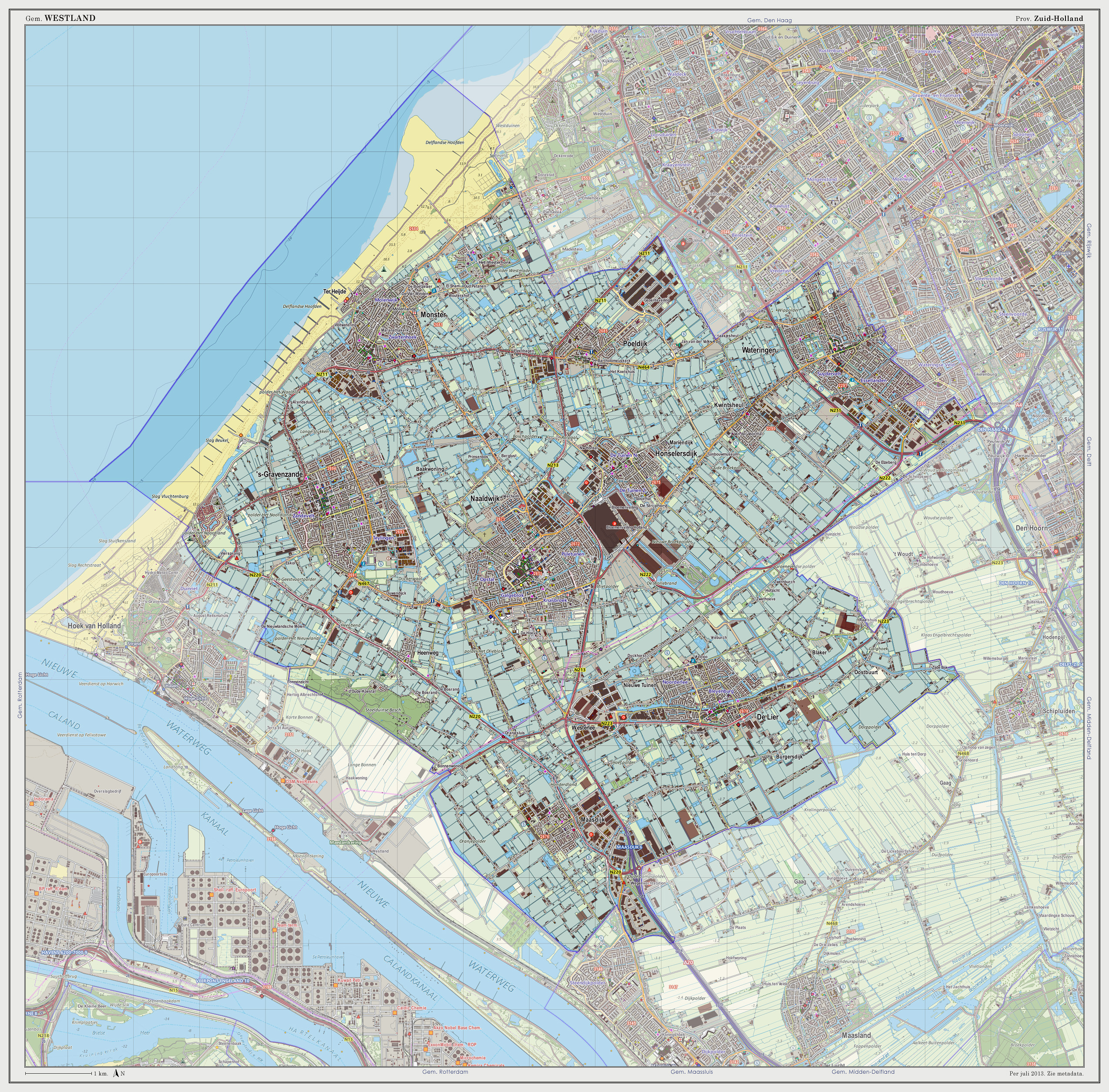 Topografische kaart van gemeente Westland (2013). Samengesteld door Jan-Willem van Aalst op basis van de GML open geodata van de BRT/Top10NL (basisregistratie Topografie, Kadaster 2011), vrijgegeven door Kadaster onder de Creative Commons BY licentie. Additionele gegevens uit BAG (8 juli 2013), uit de Open Street Map (9 juli 2013) en uit de Risicokaart. Peildatum kaartbeeld: 9 juli 2013. Zie ook Gemeentenatlas.nl Samenstelling en kleurenschema: Jan-Willem van Aalst, met QuantumGIS en Photoshop. Zie ook de Legenda.